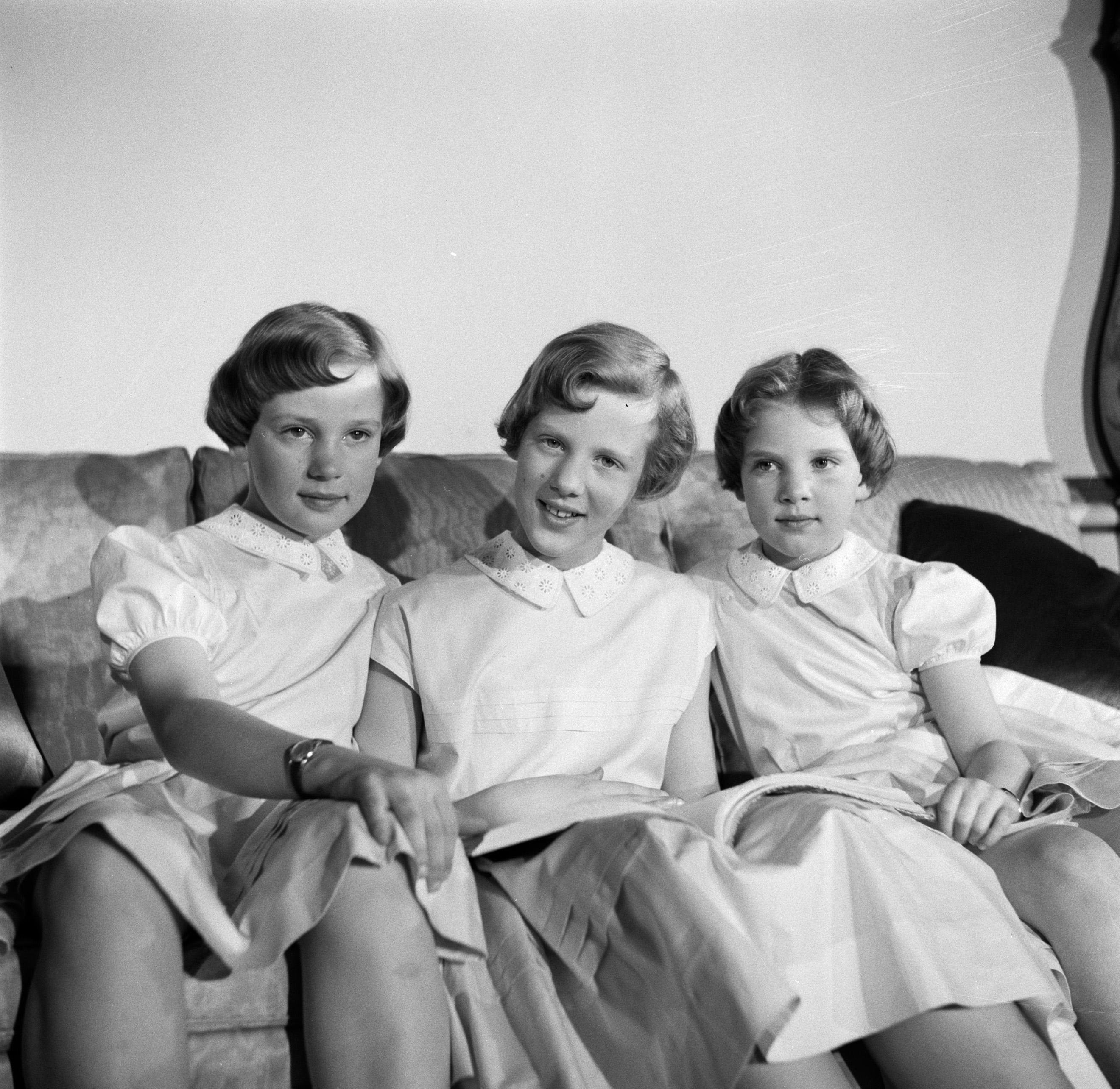 Collectie / Archief : Fotocollectie Van de Poll Reportage / Serie : Gezinsfoto's van de Deense koninklijke familie Beschrijving : V.l.n.r. Prinses Benedikte, Prinses Margrethe en Prinses Anne Marie met een boek op de bank in paleis Brockdorff Datum : maart 1954 Locatie : Denemarken, Kopenhagen Trefwoorden : gezinnen, interieurs, kinderen, klokken, meubilair, paleizen, prinsessen, woningen, zitbanken Persoonsnaam : Anne Marie (prinses Denemarken), Benedikte (prinses Denemarken), Margrethe (kroonprinses Denemarken) Fotograaf : Poll, Willem van de, [onbekend] Auteursrechthebbende : Nationaal Archief Materiaalsoort : Negatief (zwart/wit) Nummer archiefinventaris : bekijk toegang 2.24.14.02 Bestanddeelnummer : 252-8645